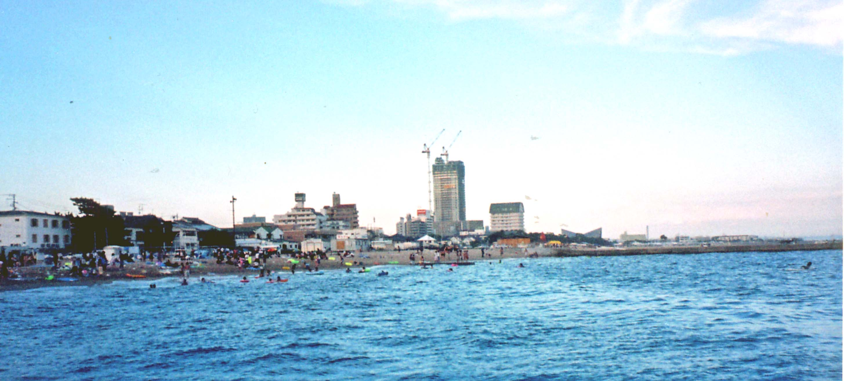 兵庫県神戸市須磨区須磨海水浴場